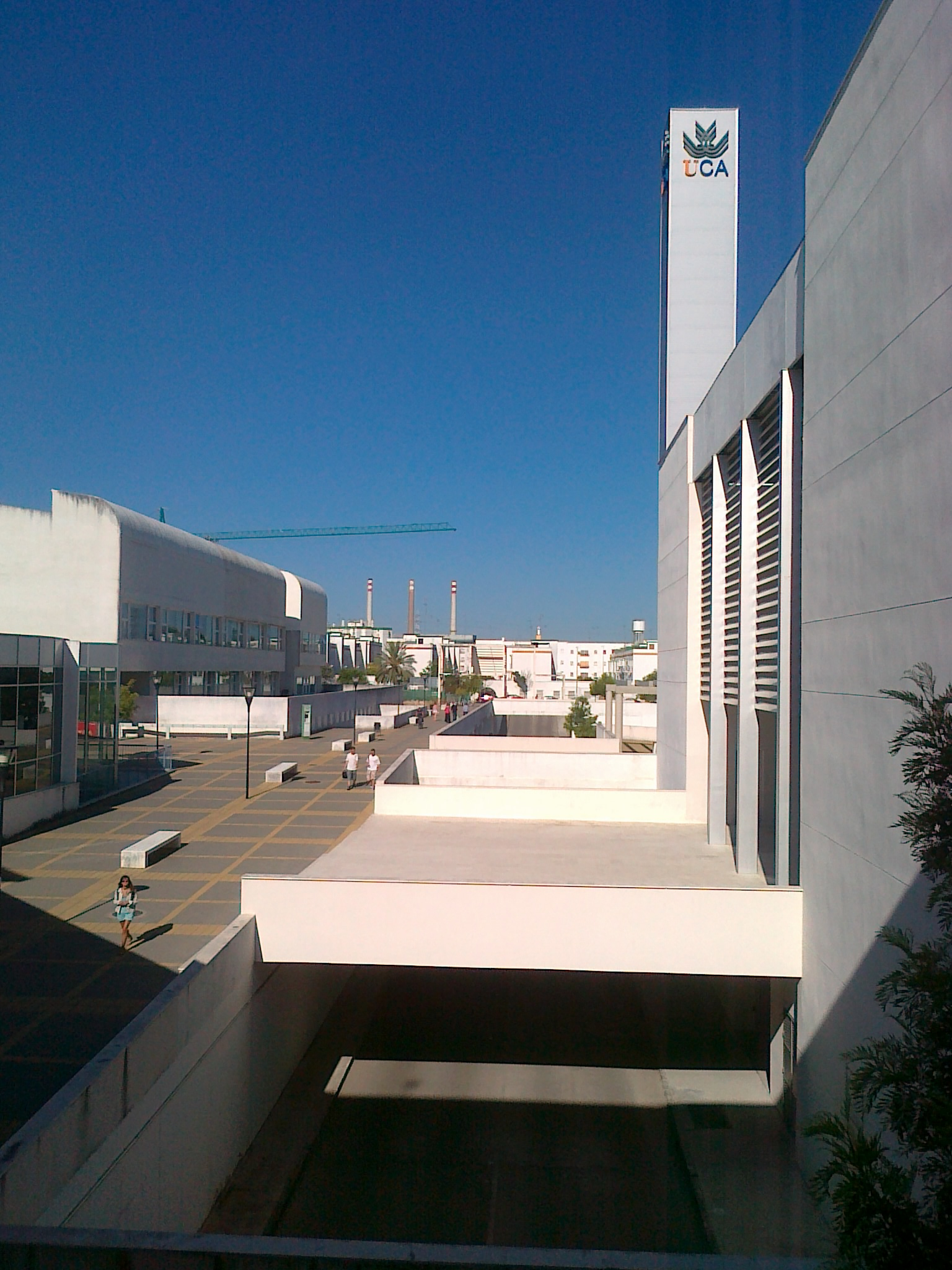 Campus de Jerez (Andalucía, España)